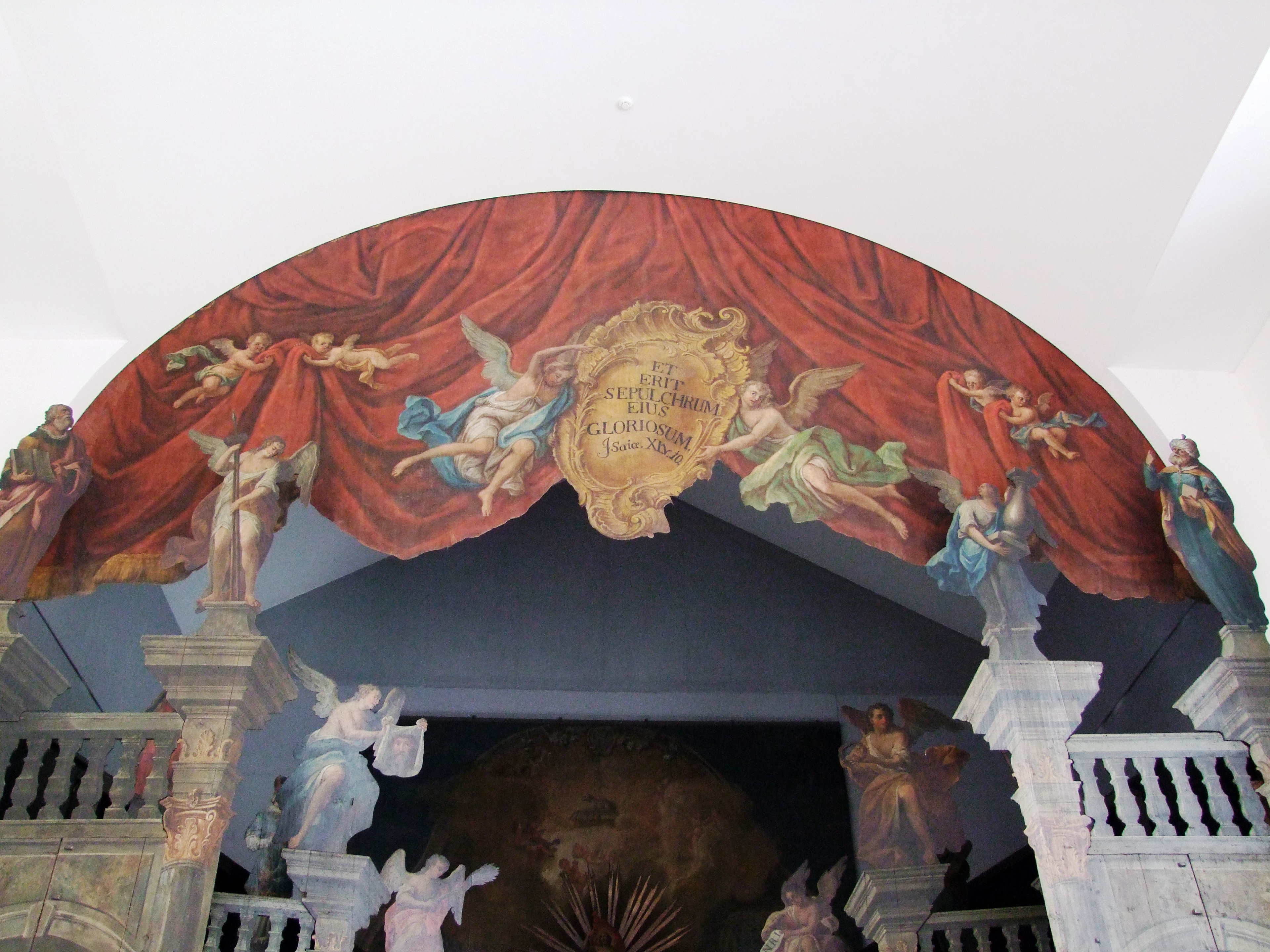 Das "Heilige Grab" in der Altshausen Heilig-Grab-Kapelle